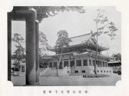 장충단(奬忠壇)의 서측 언덕(現 신라호텔 영빈관 자리)에 자리한 춘무산(春畝山) 박문사(博文寺)의 전경 사진이다. 출처 『躍進朝鮮大觀』(帝國大觀社, 1938)